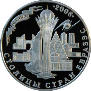 Памятная монета Республики Казахстан Серия «Столицы ЕврАзЭС. Астана» - Серебро 500 тенге - реврс